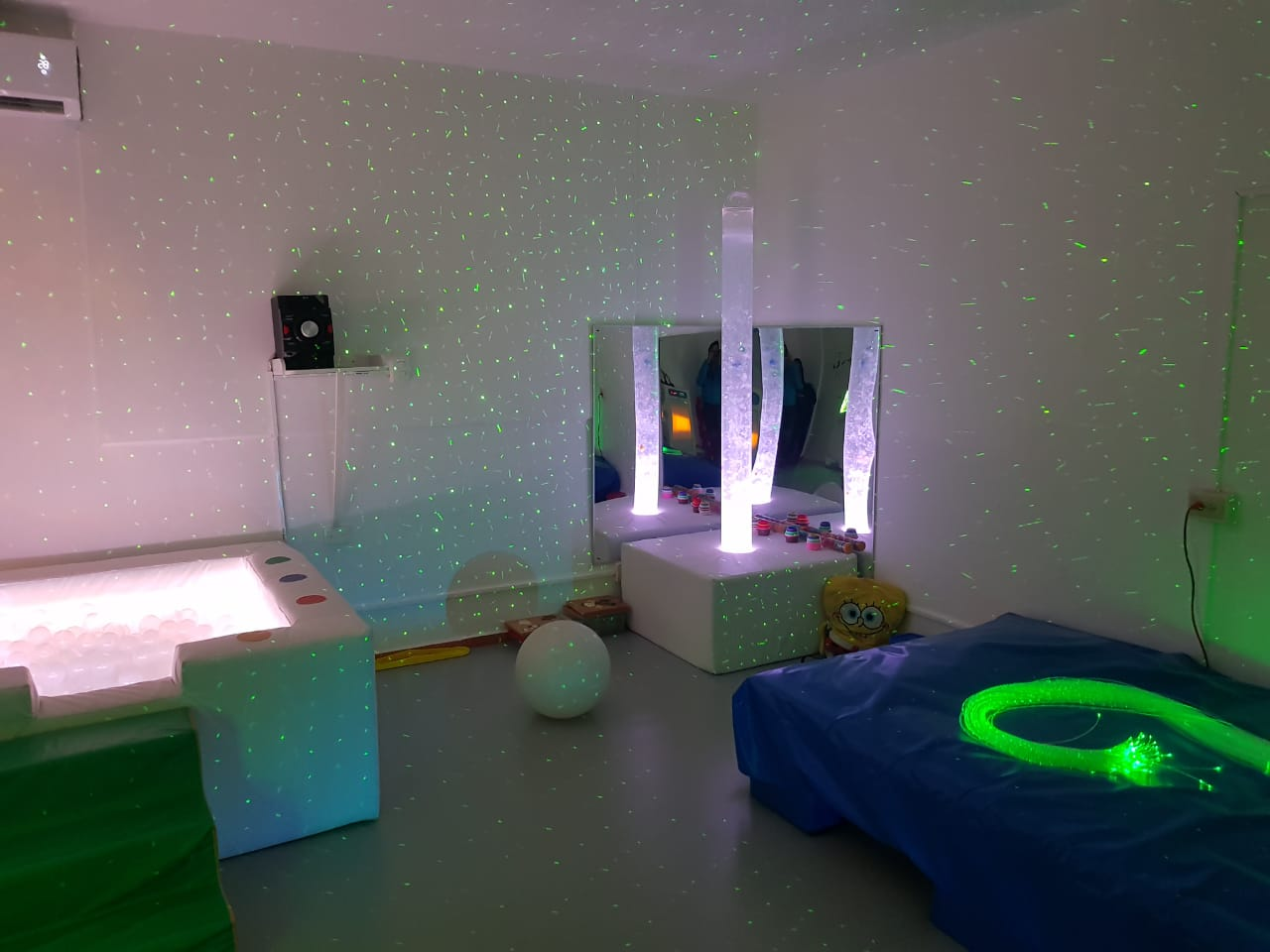 En esta imagen se muestra una sala multisensorial equipada con una alberca de pelotas interactiva que cambia de color en sincronía con la columna de burbujas y una cama de agua que vibra con la música.